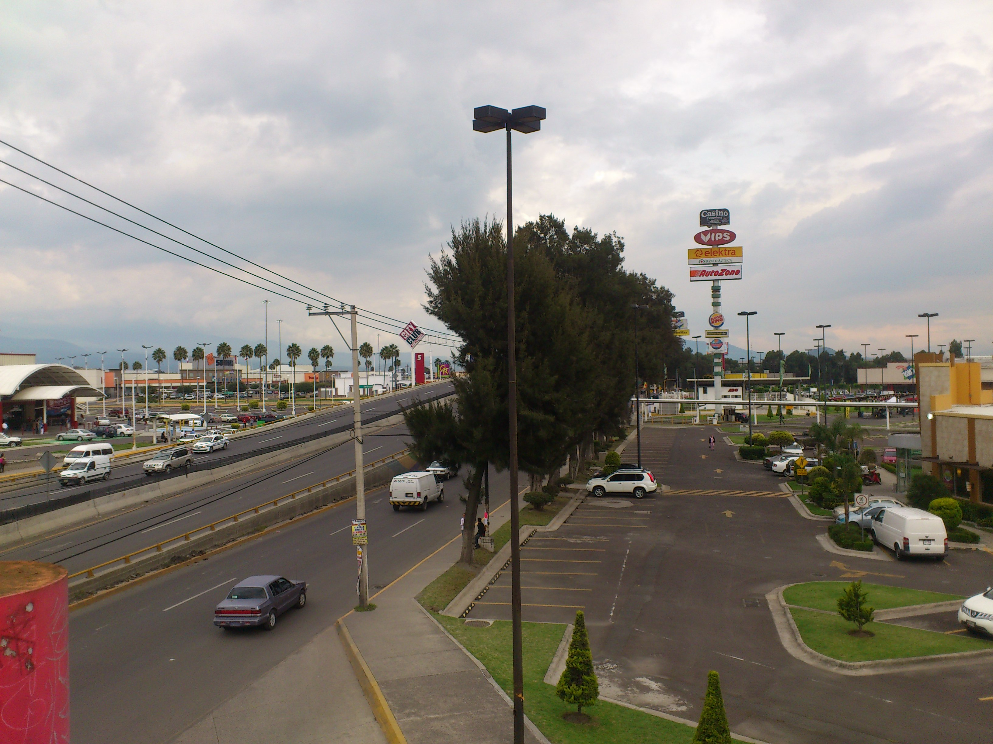 sendero y cortijo